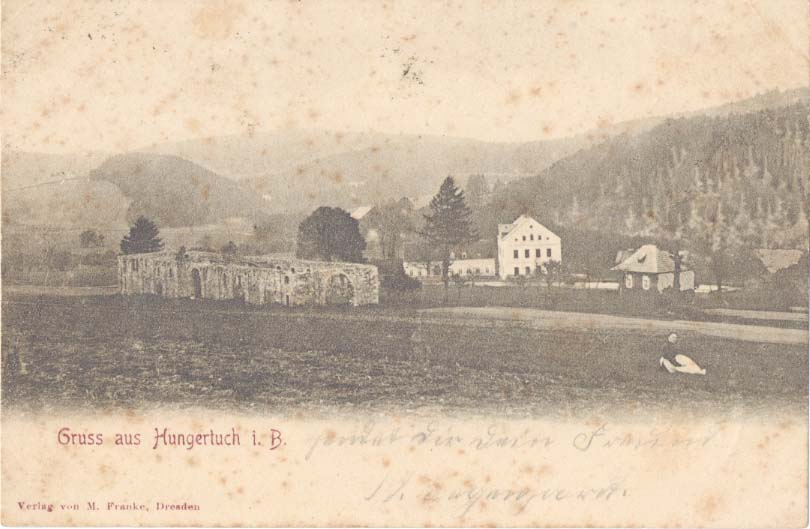 Hungertuch